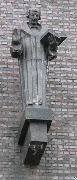 Klinker-Plastik Johannes Bugenhagen (1928) von Richard Kuöhl an der Bugenhagenkirche (Barmbek-Süd) 22. April 2005 This is a photograph of an architectural monument.